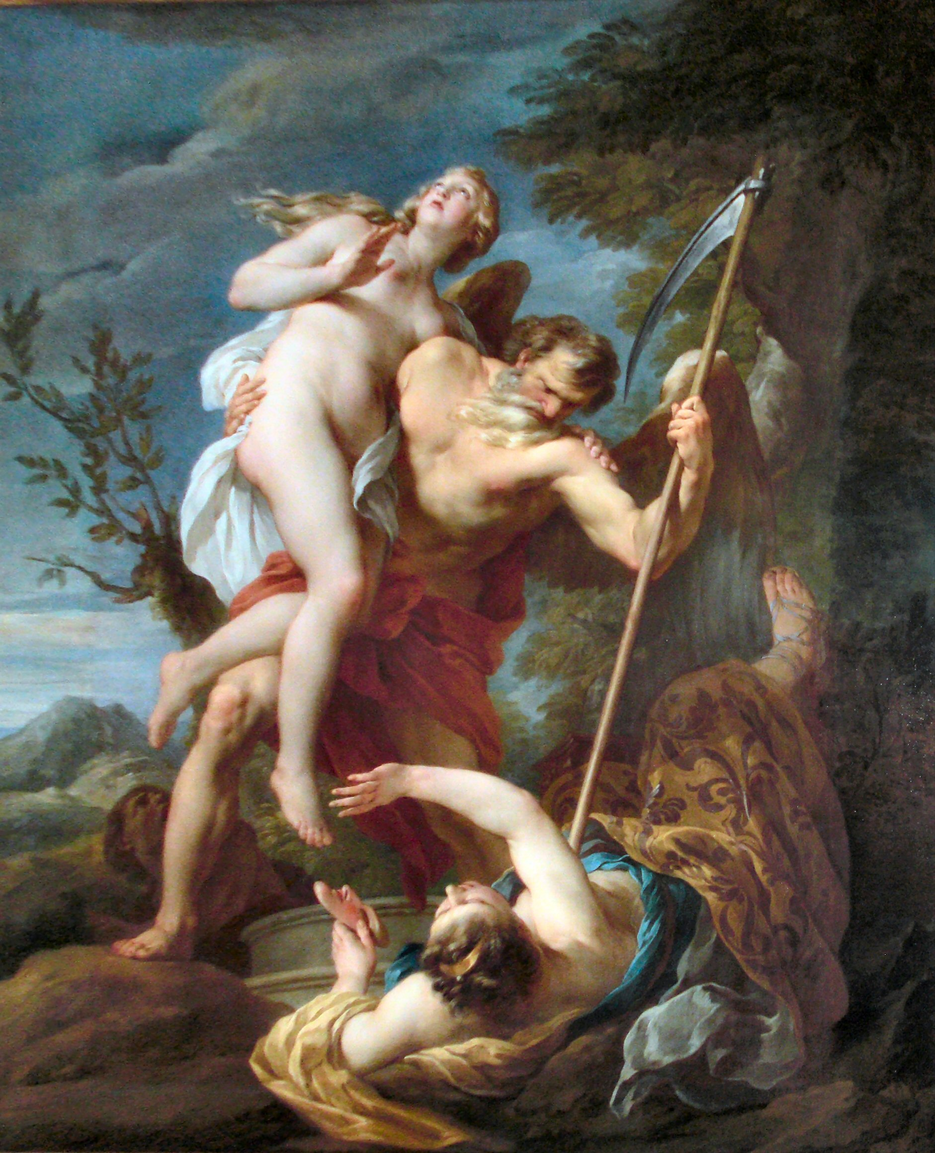 « Le Temps » représenté sous les traits de Saturne (un veillard aîlé armé d'une faux) porte une femme, « la Vérité », et en terrasse une autre, qui gît à terre, « le Mensonge et l'Envie » (masque tenu de la main gauche).